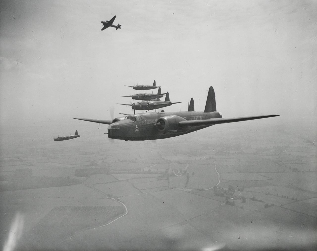 From a fascinating set of World War II photos, mainly medium format transparencies and some negatives. See set description for more information.